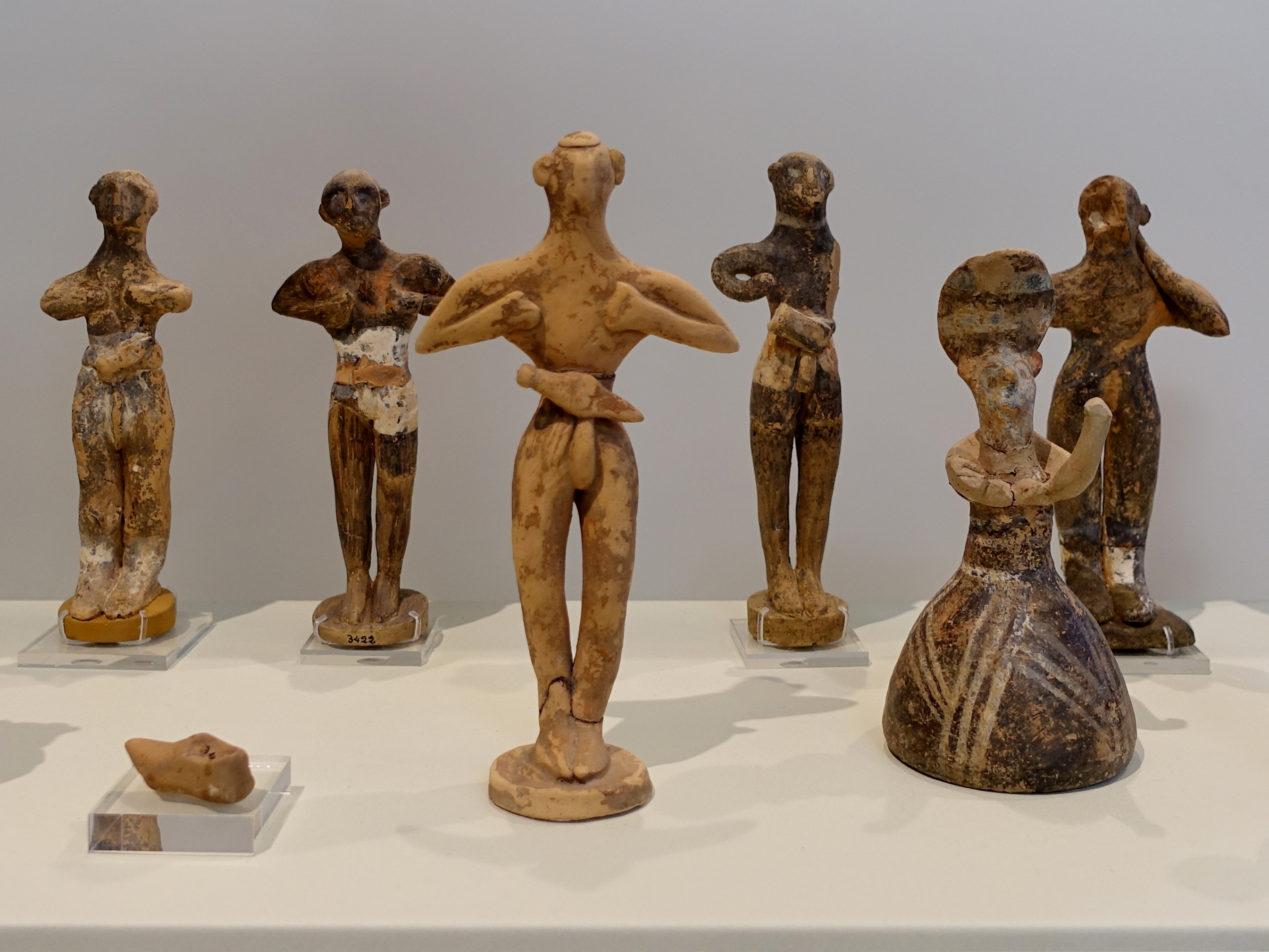 Tonfigurinen (Altpalastzeit, 1900–1700 v. Chr.) aus dem Höhenheiligtum von Petsophas (Palekastro), ausgestellt im Archäologischen Museum Iraklio, Kreta, Griechenland